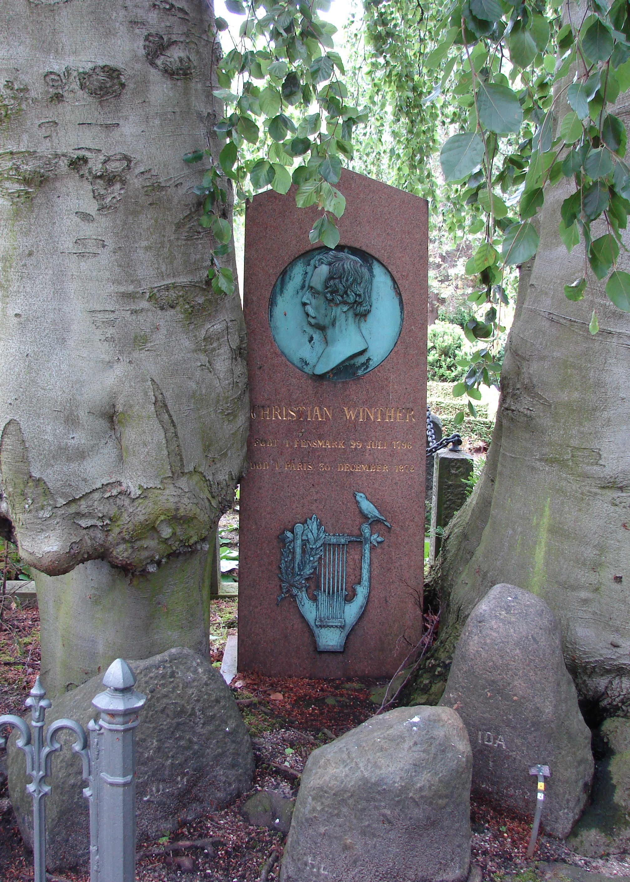 Christian Winther (1796-1876), digter, gravmæle, Holmens Kirkegård, København